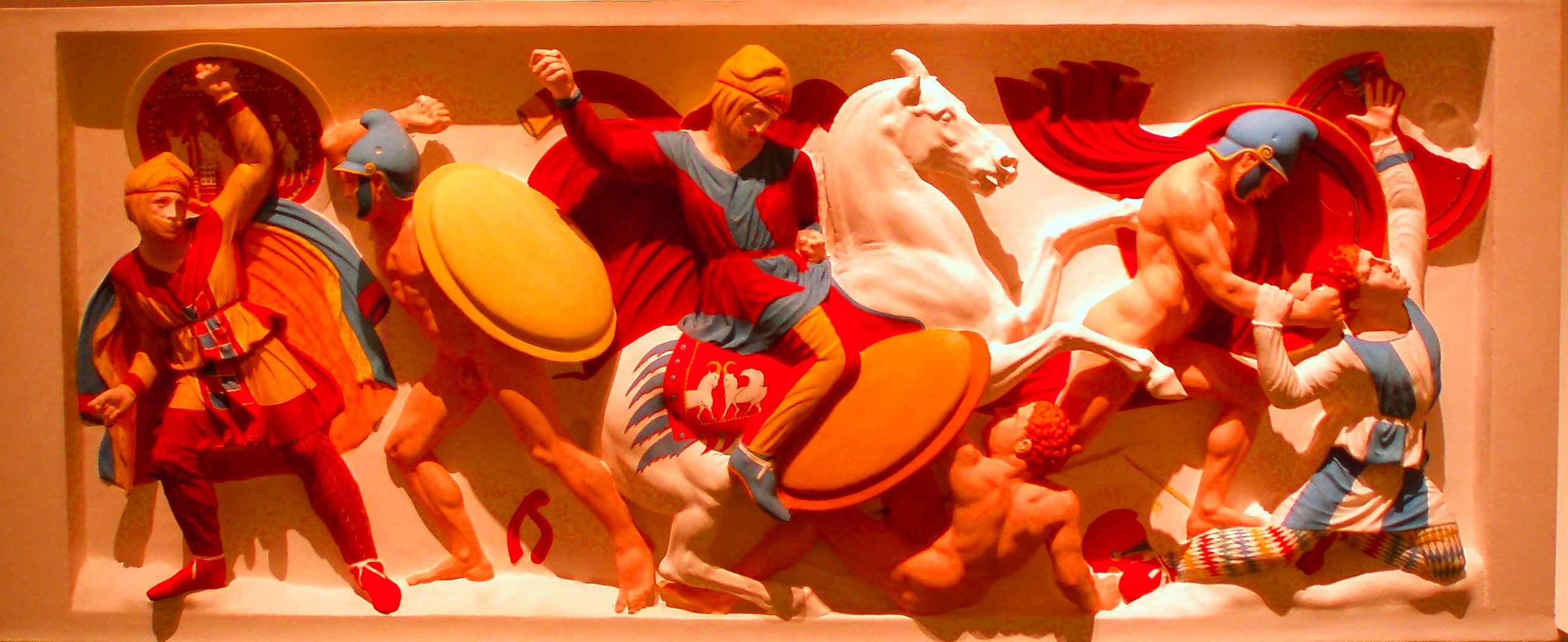 Restitution du décor polychrome du sarcophage dit d'Alexandre, provenant de la nécropole royale de Sidon, représentant la bataille d'Issos. Etude : Vinzenze Brinkmann et Ulrike Koch-Brinkmann. Stéréolithographie : Alphaform, Munich. Restauration des parties manquantes : Joseph Kotti, Sylvia Kellner. Peinture : Ulrike Koch-Brinkmann. Original : Musée national archéologique d'Istanbul. Exposition « Bunte Götter » dans la version montrée à Athènes. Colour-adjusted version